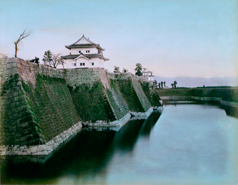 Tamamura Kozaburō - "Sans titre" - Japon. Les fortification de Tokyo - Japon. Les fortification de Tokyo, Photographie sur papier albuminé réhaussée de pigments - 24.9 x 19.4 cm - 1979.1.63